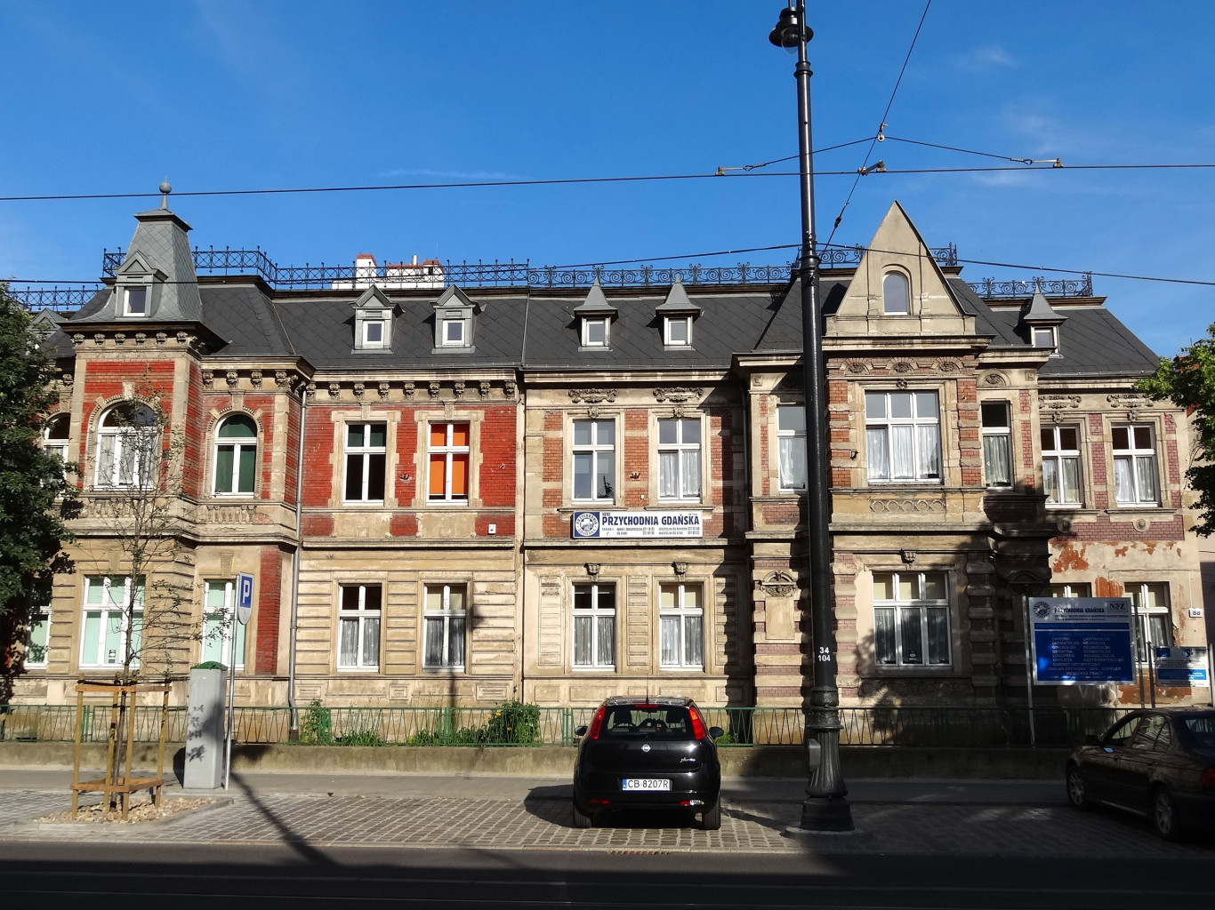 Dom przy ul. Gdańskiej 88-90 w Bydgoszczy (1888-1889)